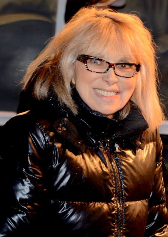 Mireille Darc à l'avant-première française de "The Monuments men"